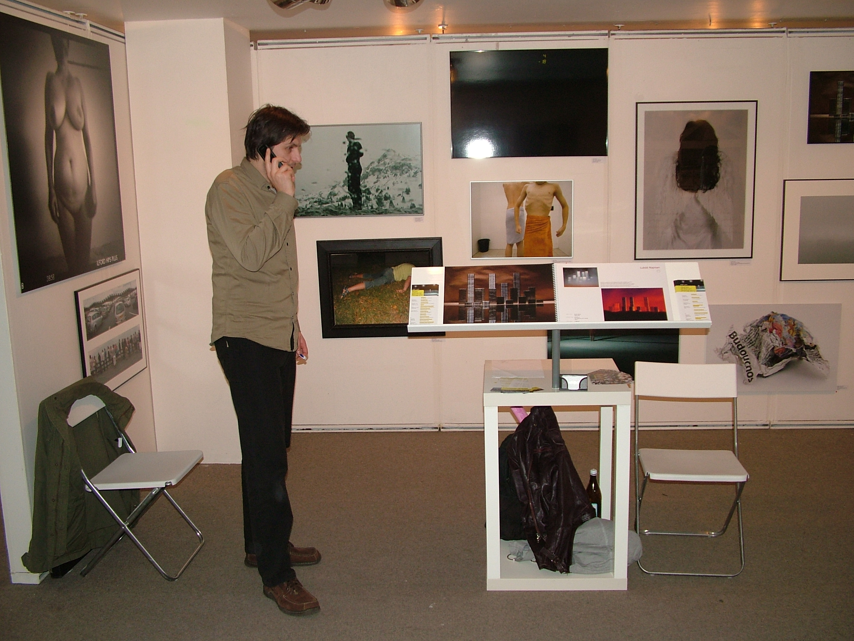 Výstava, festival, Prague Photo 2011 Budova: Mánes, Praha Trvání: od 4. dubna do 10. dubna 2011. Datum: 10. dubna 2011.